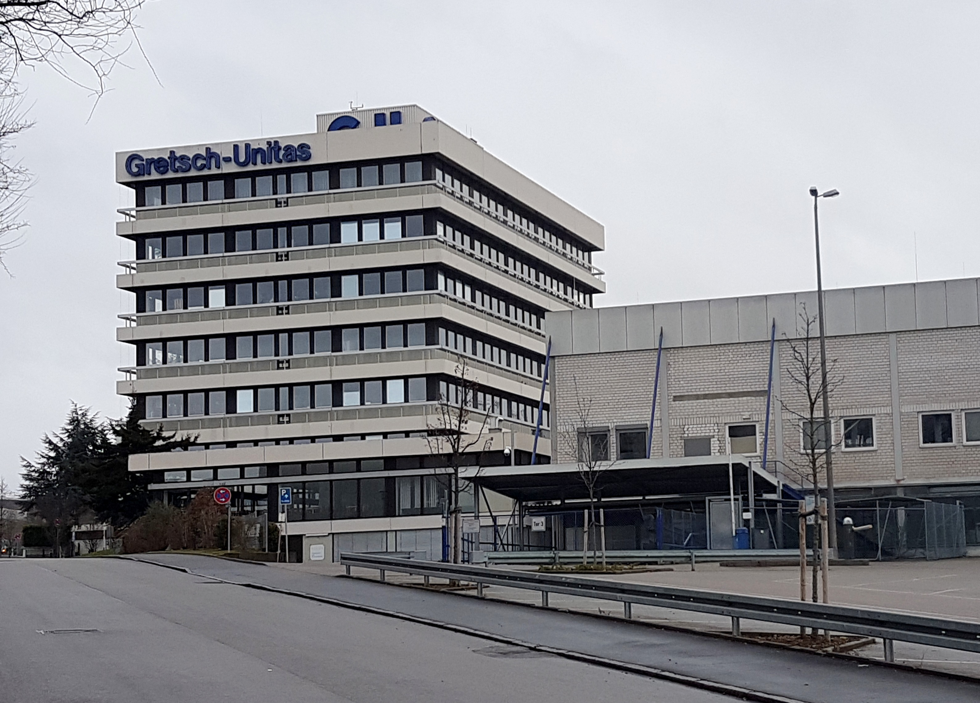 Ditzingen, Verwaltungsgebäude der Firma Gretsch-Unitas